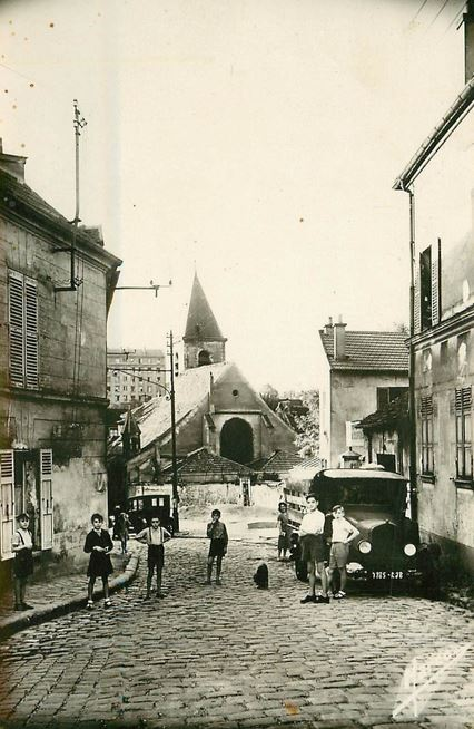 Bagnolet: Eglise Saint-Leu-Saint-Gilles, rue Lénine (Ancienne rue de Montreuil)